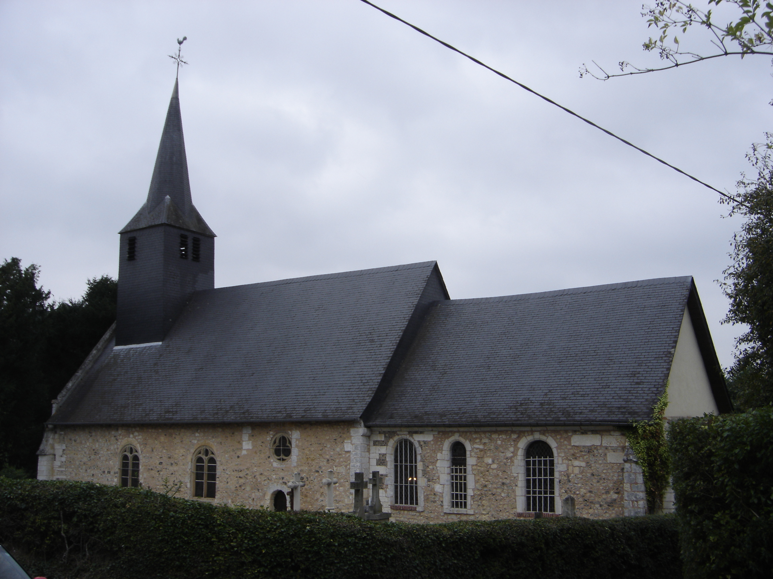 église de Saint-Martin-Saint-Firmin - Eure - France